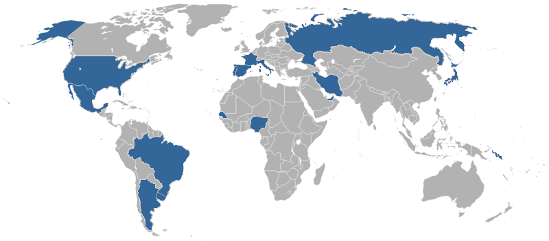 localisation des équipes participant à la coupe du monde de football de plage 2007.